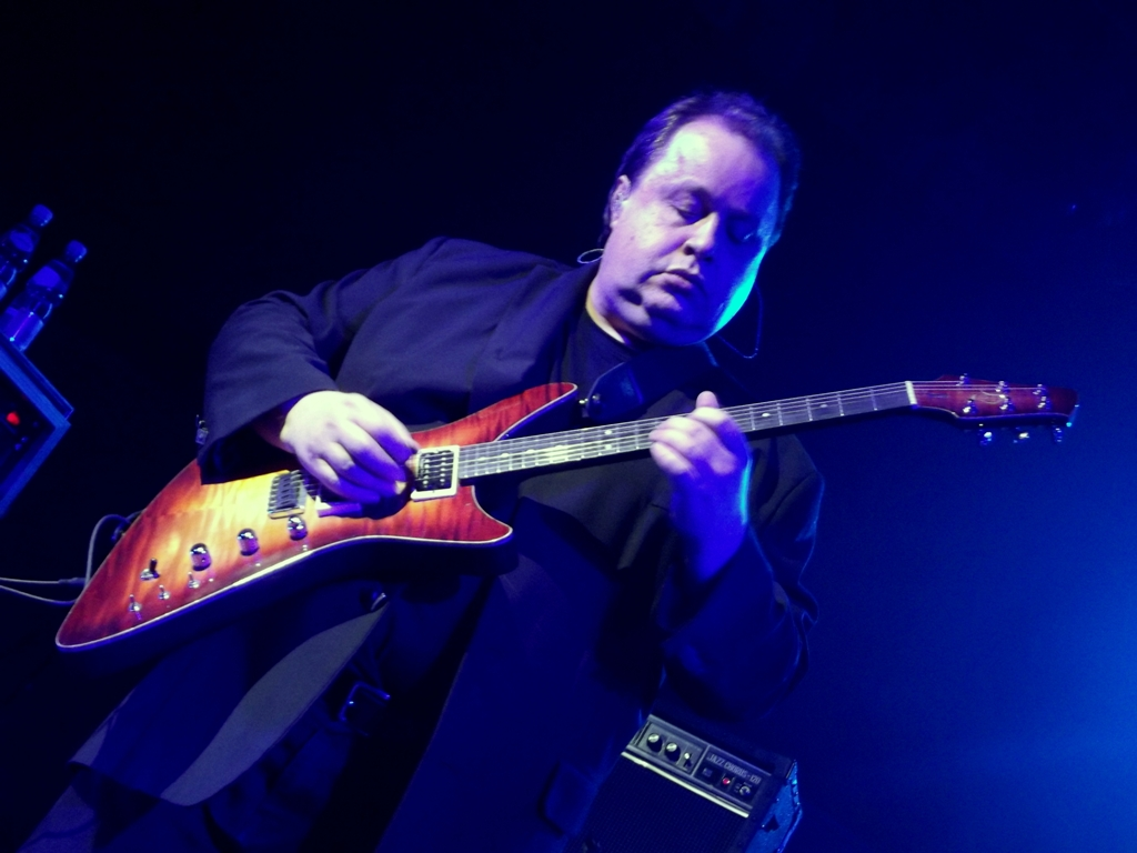 Zdjęcie zrobione podczas koncertu zespołu Marillion w krakowskim Klubie Studio.